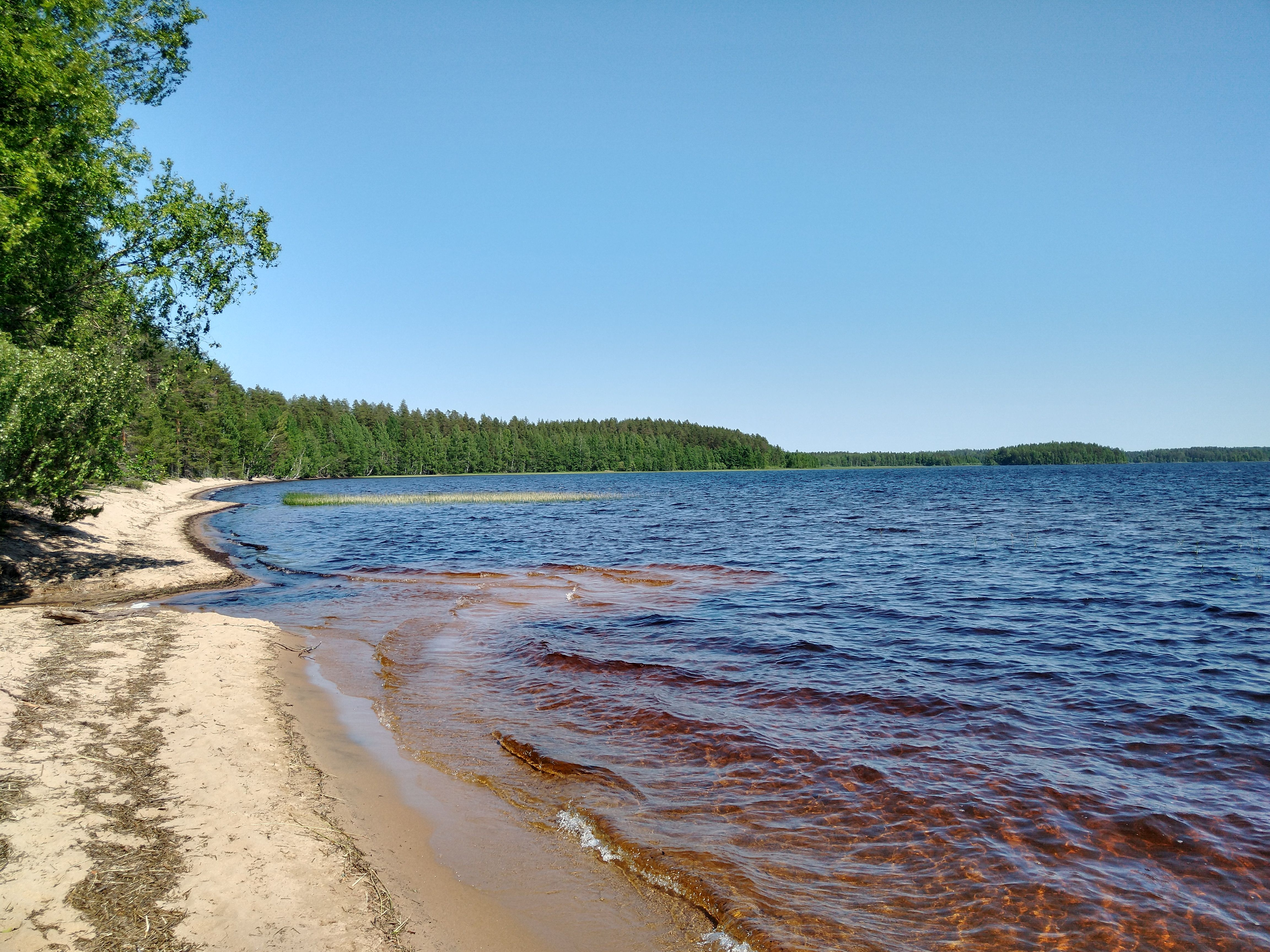 Iso-Naakkiman ranta lähellä kivikauden asuma-aluetta.